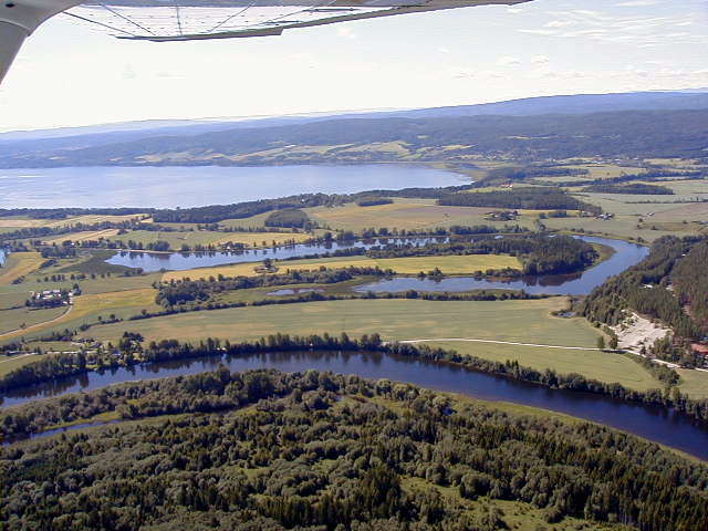 Synneren (naturreservat)